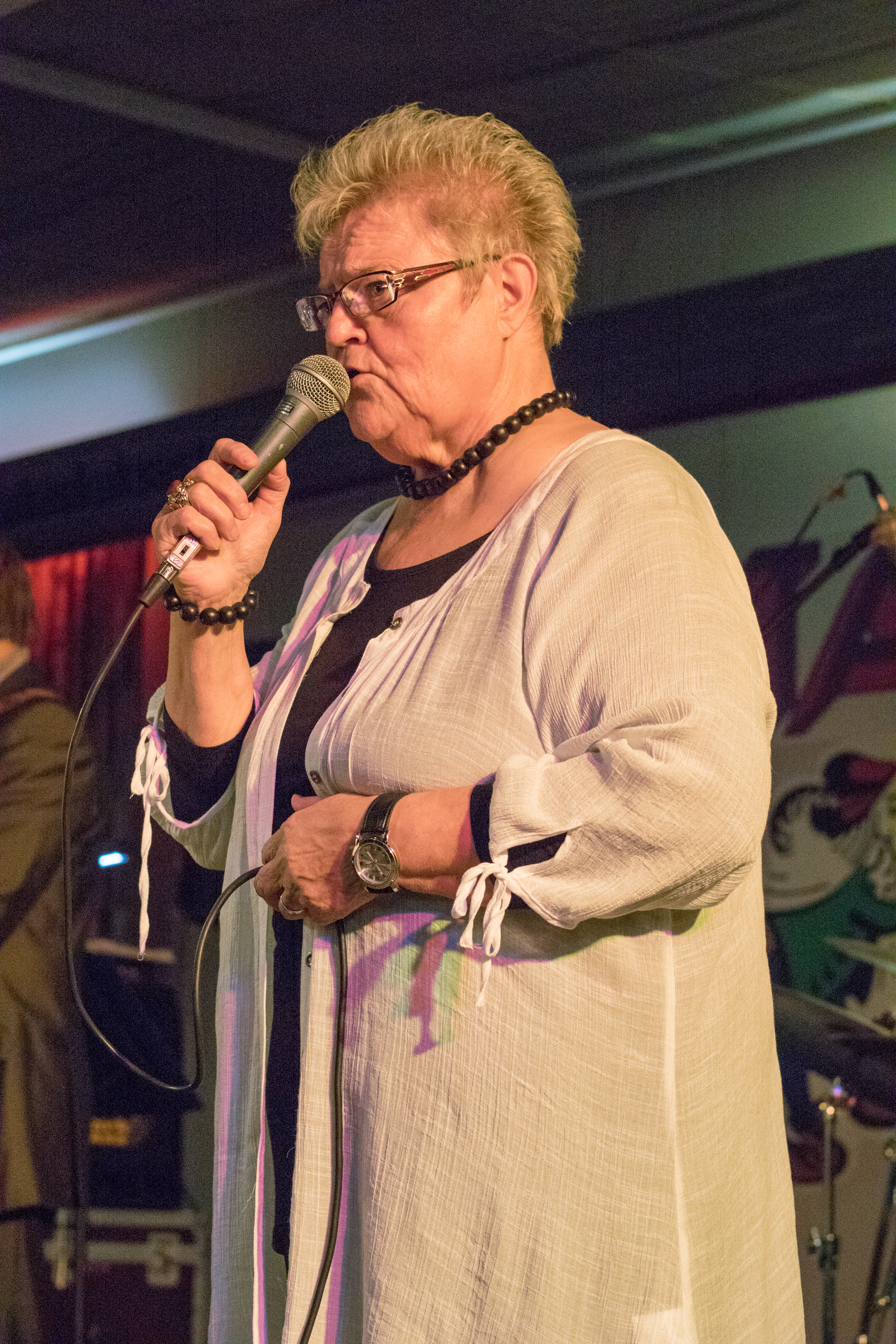 Arja Havakka suomalainen laulaja